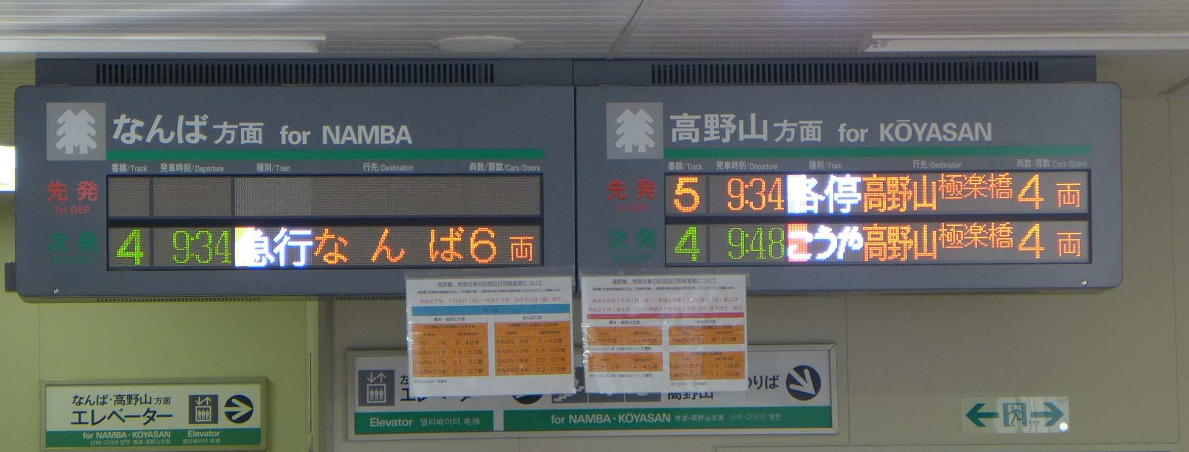 南海橋本駅の行先表示器（LED式）